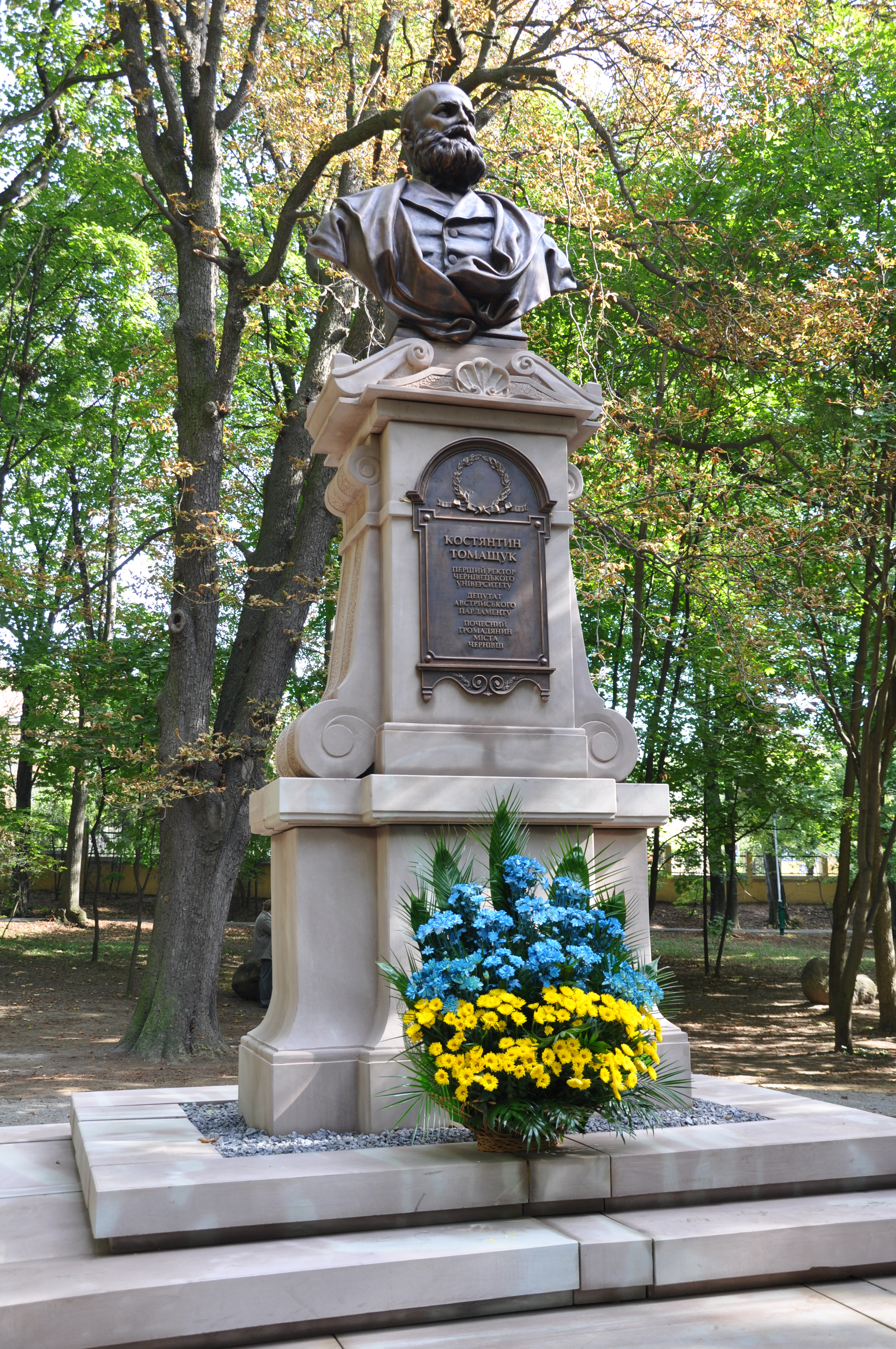 Restauriertes Denkmal für Constantin Tomaszczuk in Czernowitz.